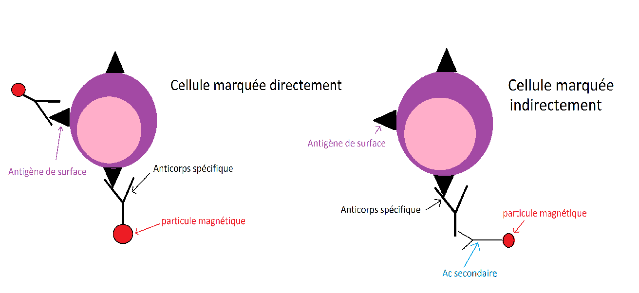 schéma explicatif d'immunomarquage direct ou indirect